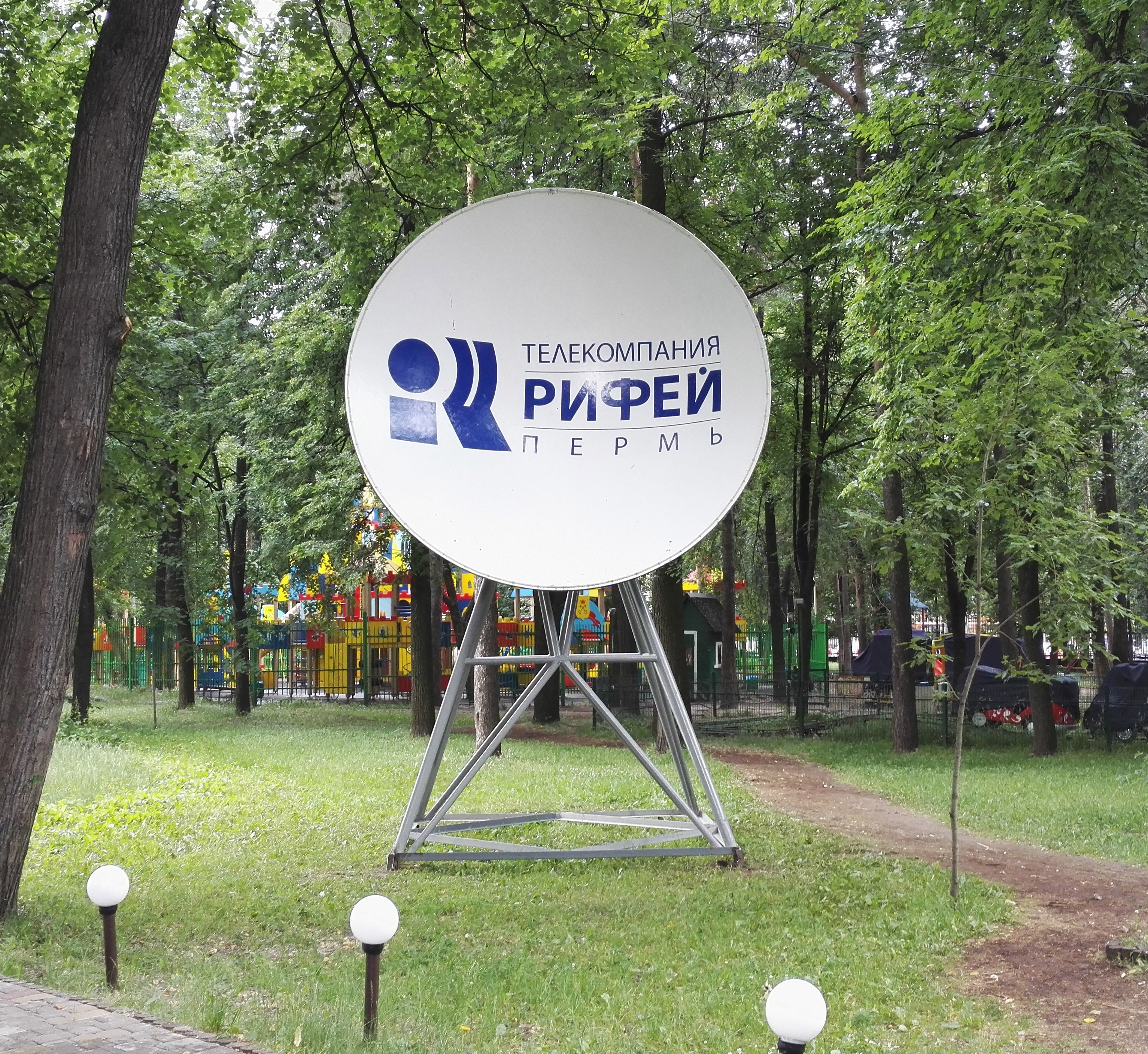 Рекламная конструкция в Парке имени Горького